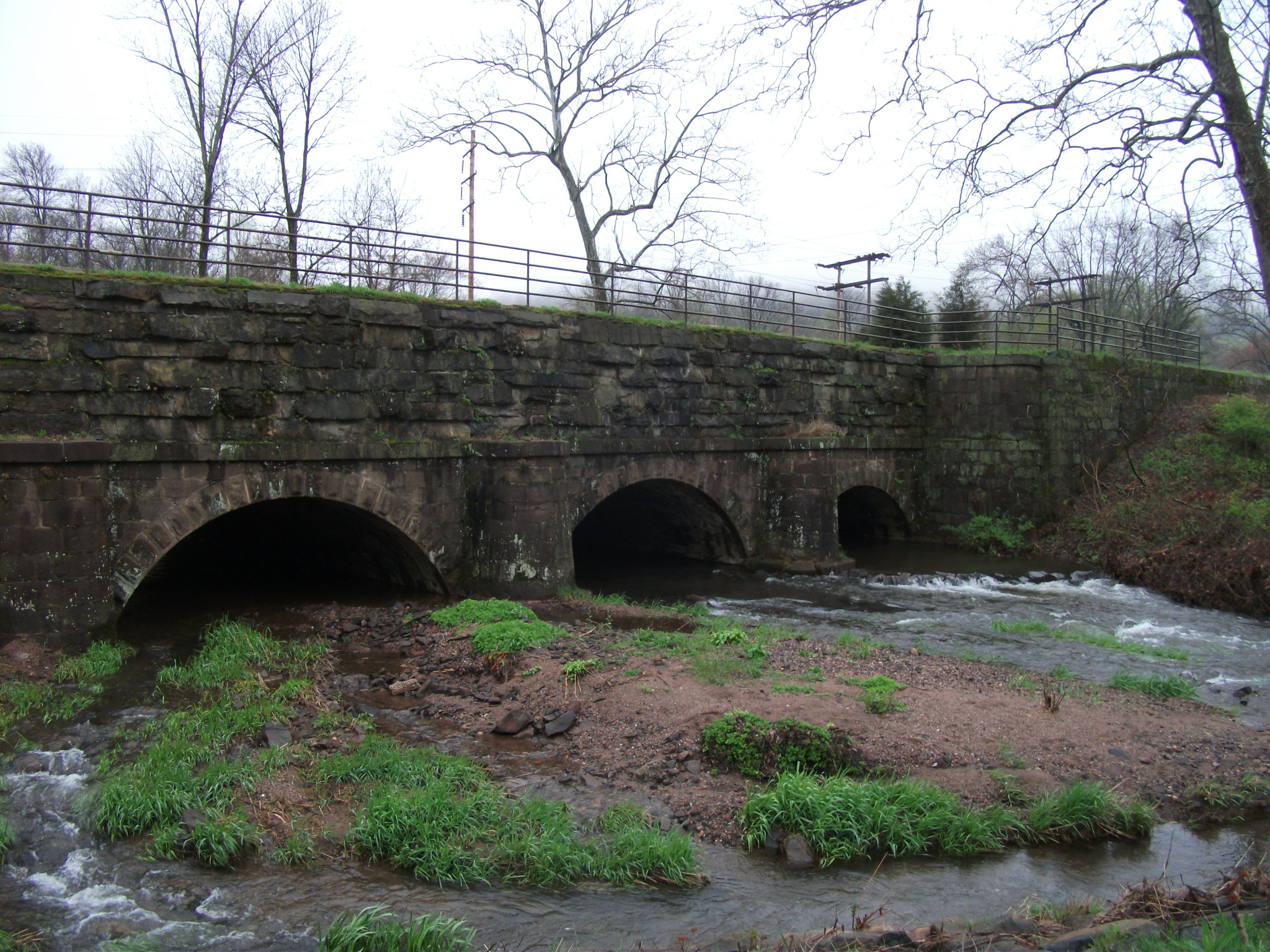 Allegheny Aqueduct - Gibraltar, Pennsylvania